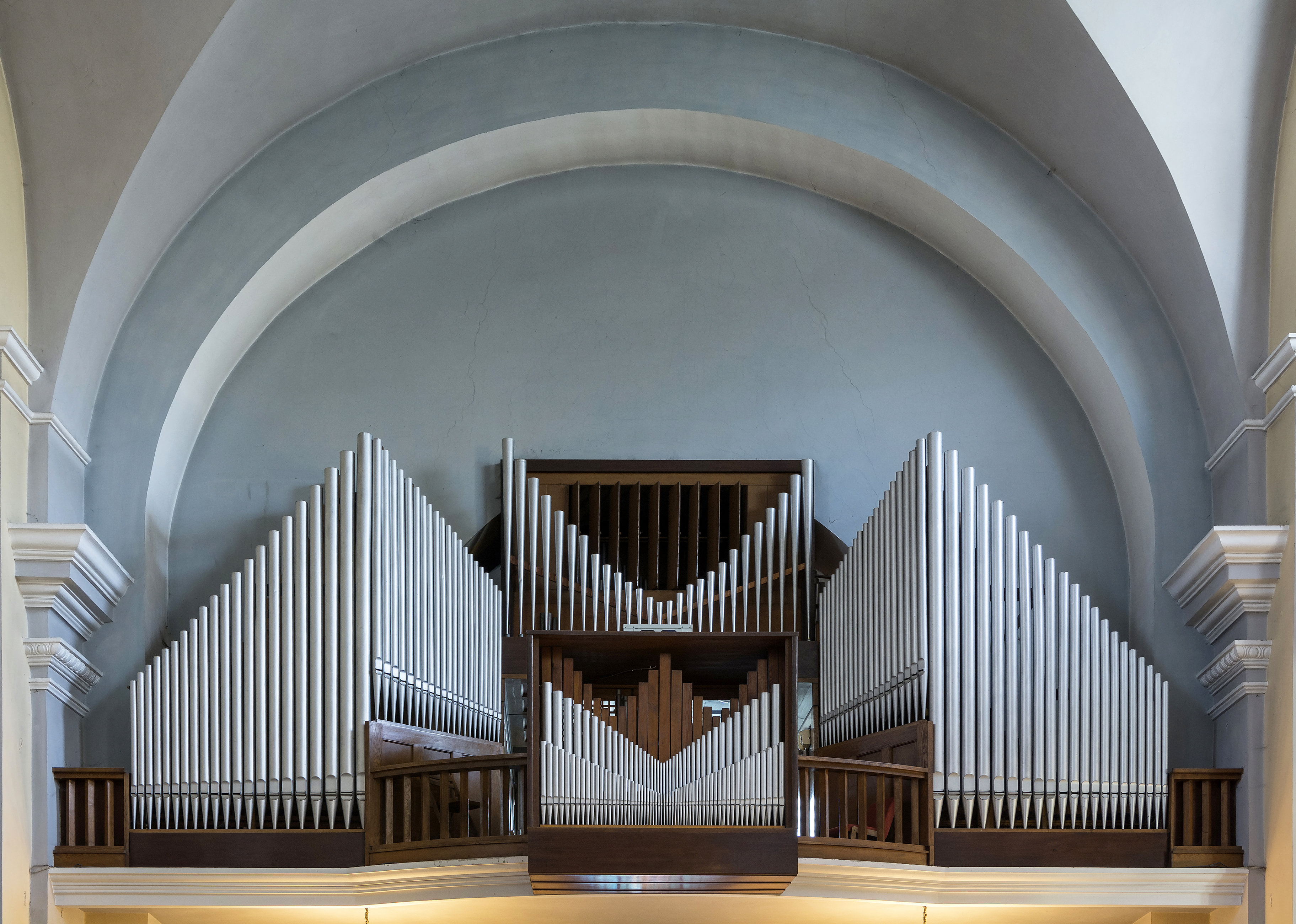 Tarnobrzeg, kościół p.w. Wniebowzięcia NMP, 1693-1707, 1904-1909 Ta fotografia przedstawia zabytek wpisany do rejestru zabytków pod numerem ID 632593